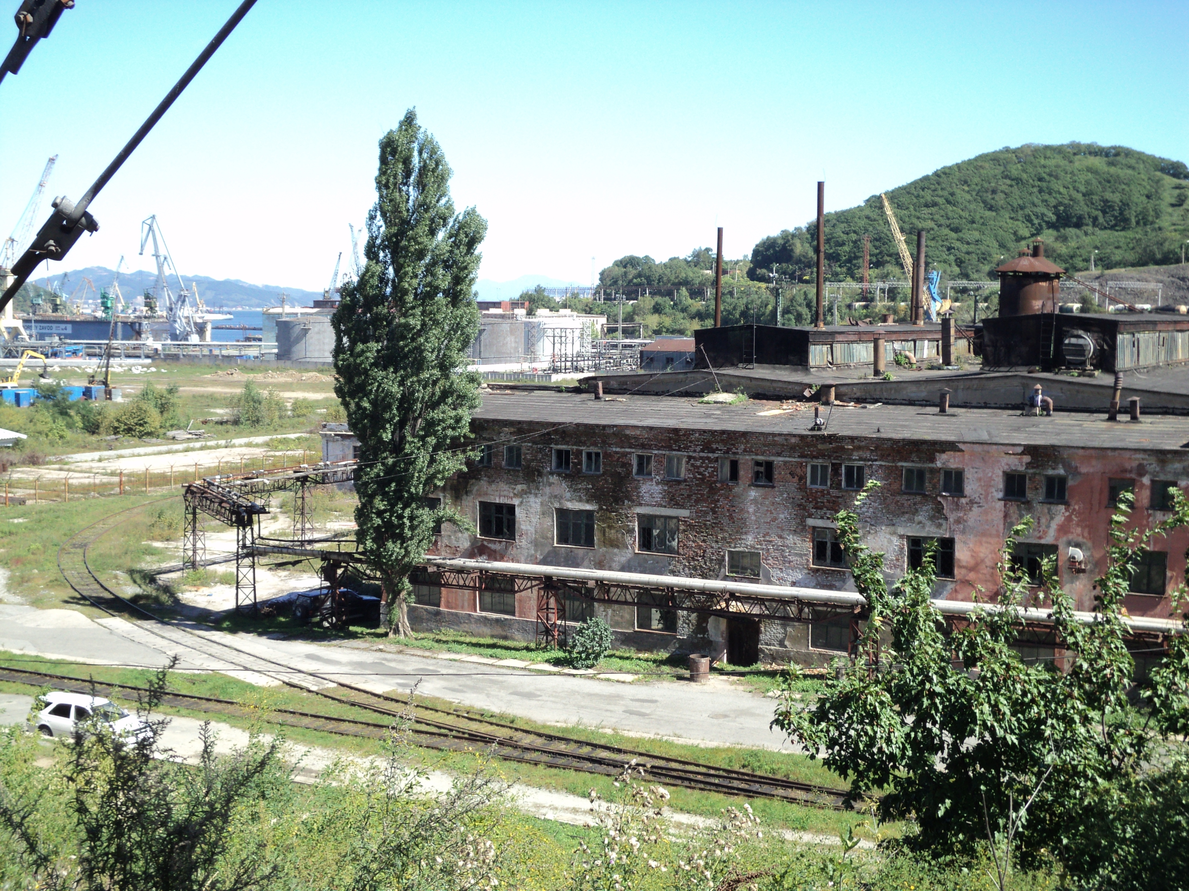 Производственные здания Приморского завода